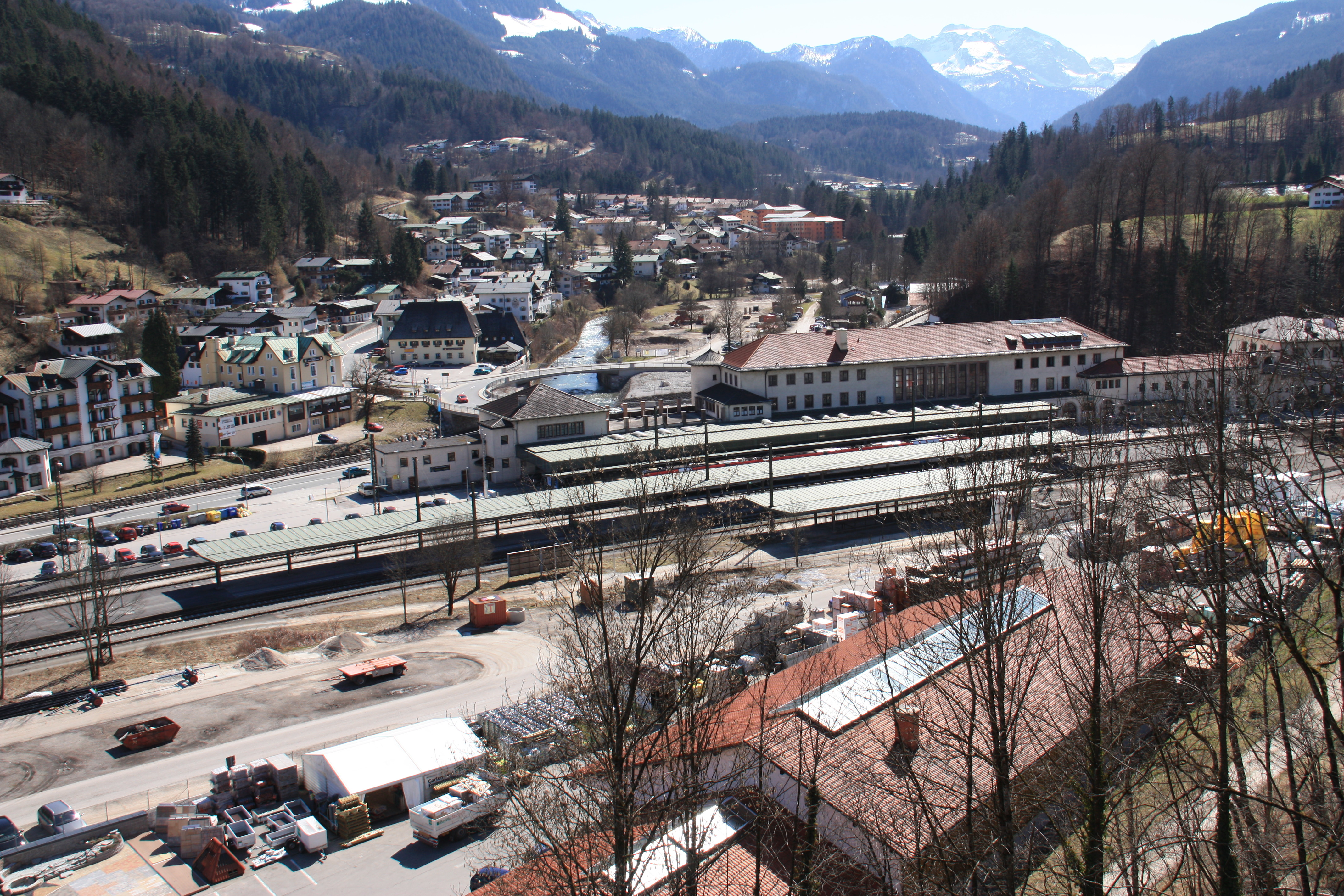 Der Süden Berchtesgadens mit Hauptbahnhof, von der Ortsmitte aus gesehen´.